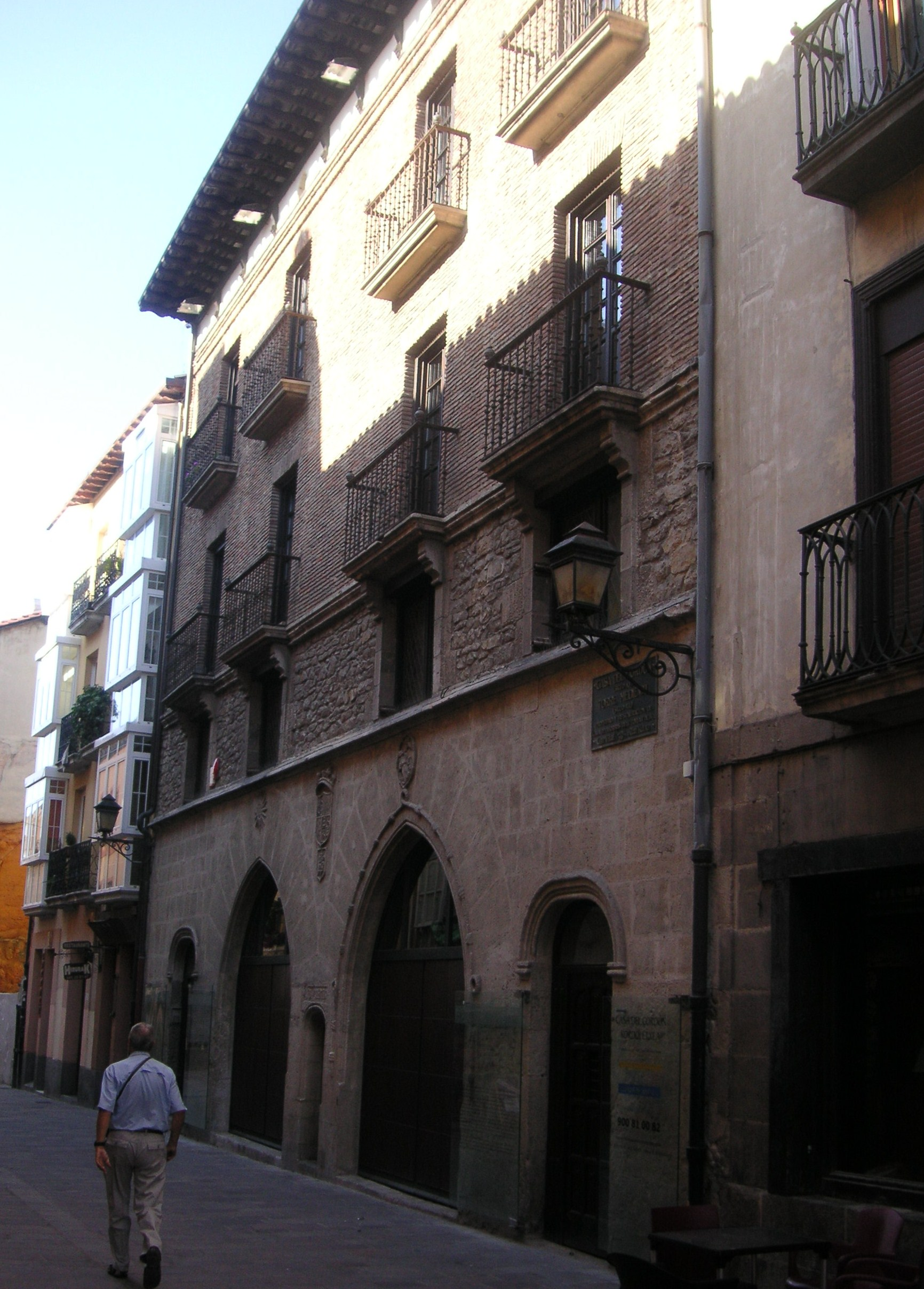 Casa del Cordón en Vitoria-Gasteiz, País Vasco